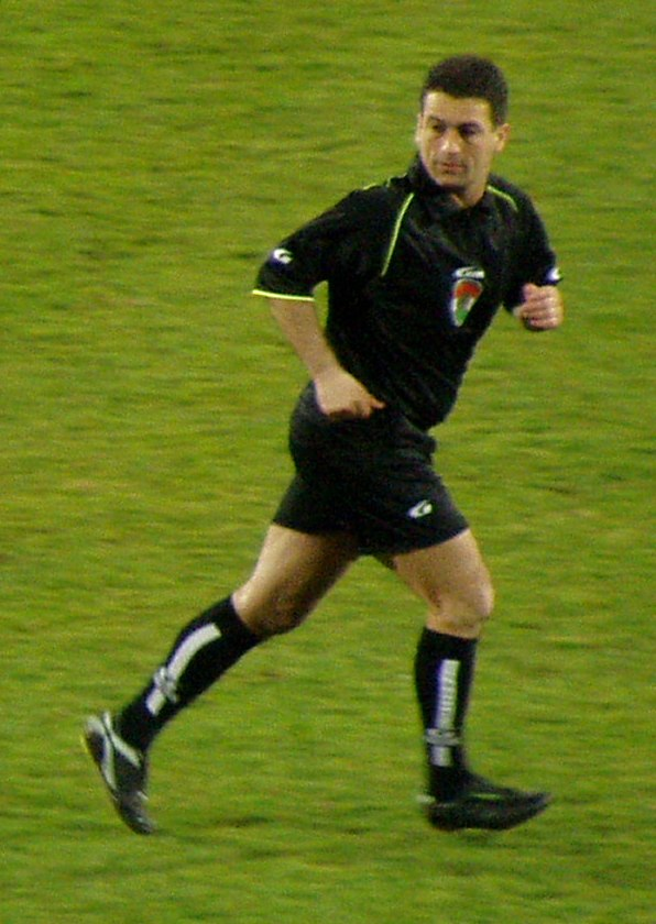 Arany Tamás magyar játékvezető